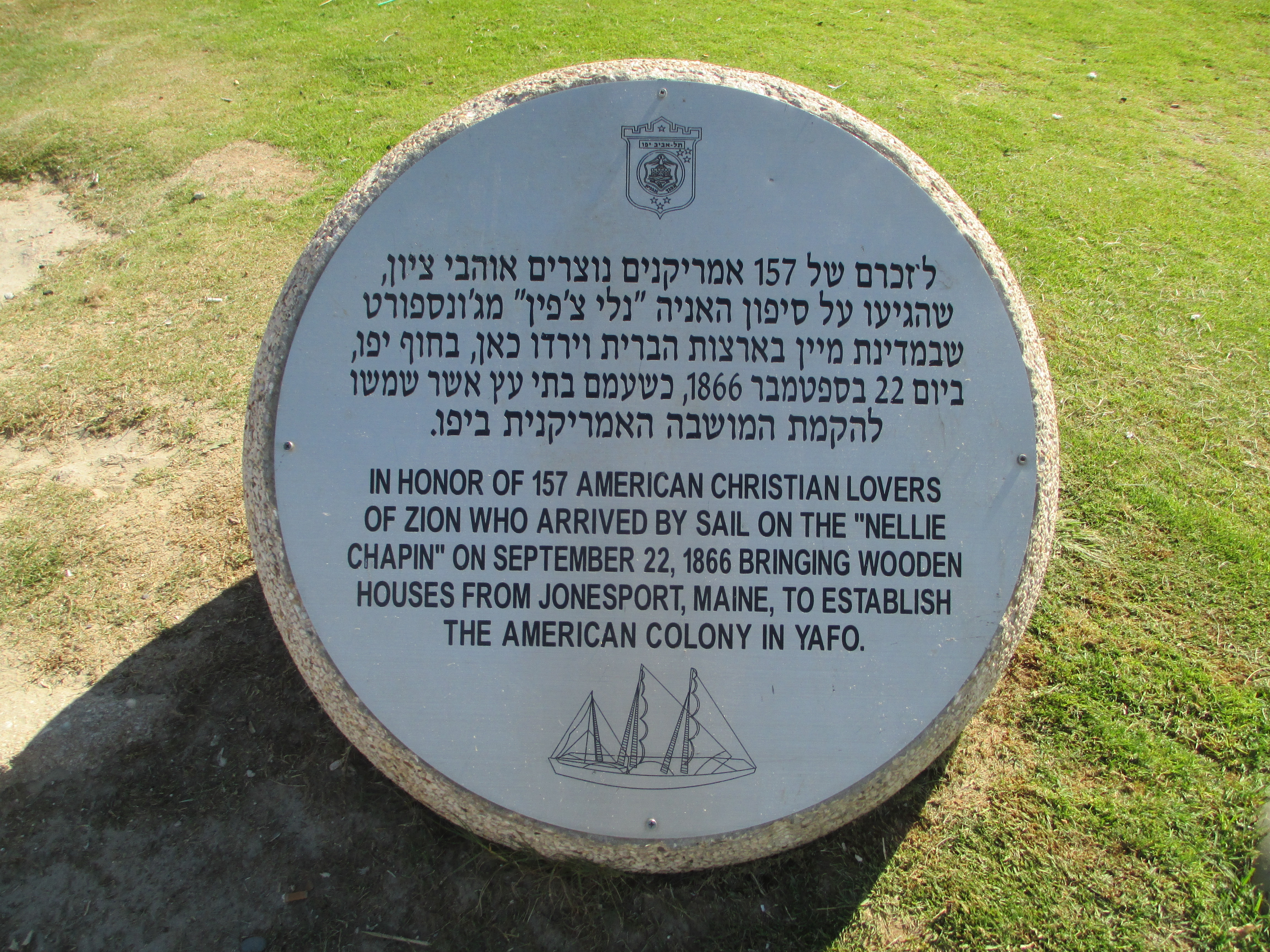 לוחית זיכרון למושבה האמריקאית ביפו